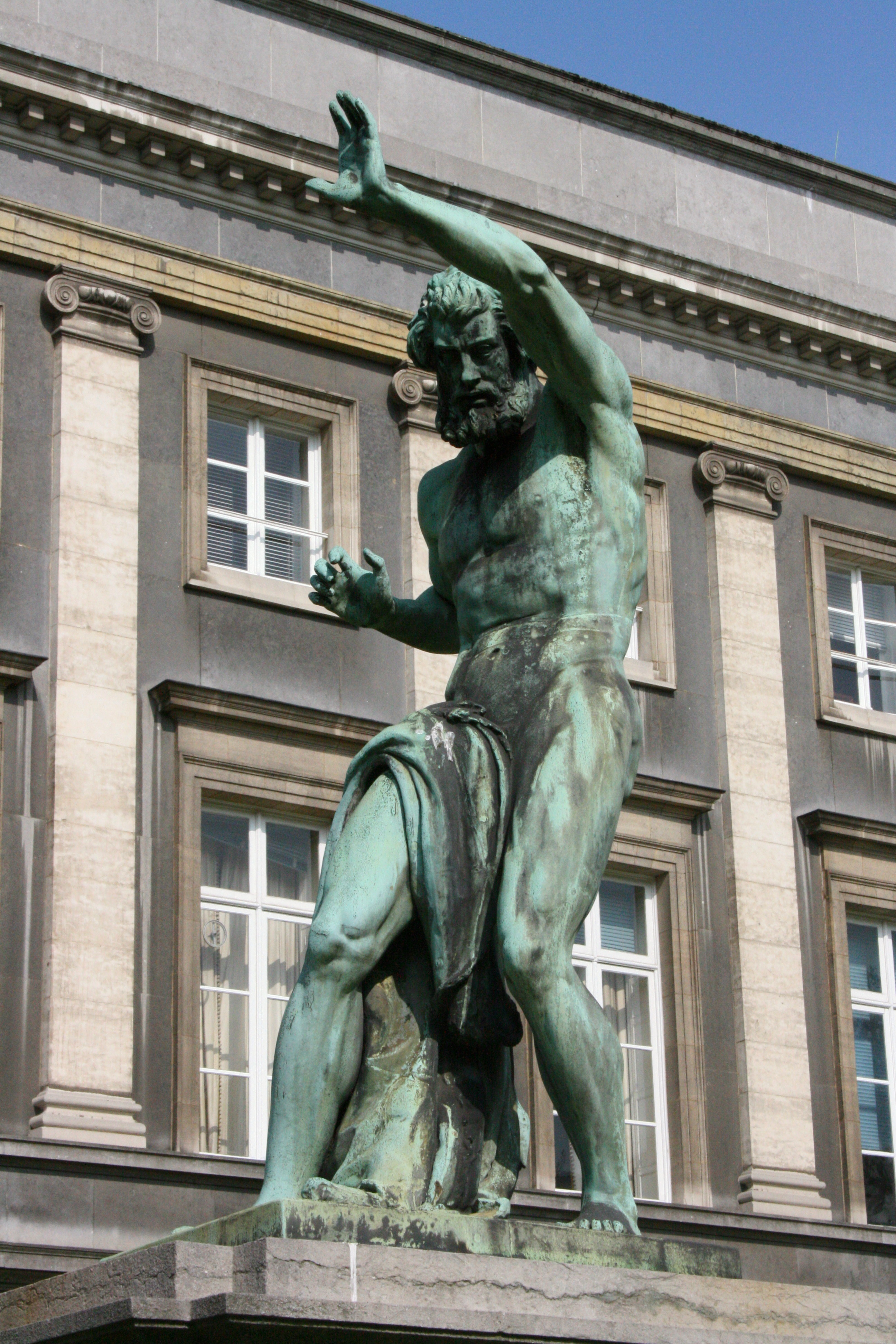 Palais des Académies, rue Ducale, Bruxelles (Belgique). Caîn maudit, statue de Louis Jehotte